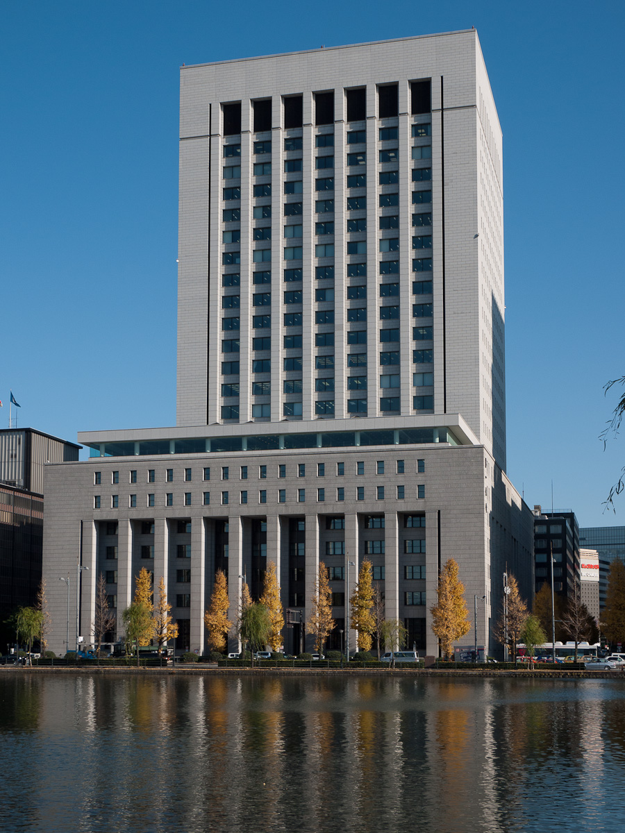 DNタワー、第一生命館。東京都千代田区有楽町1丁目。